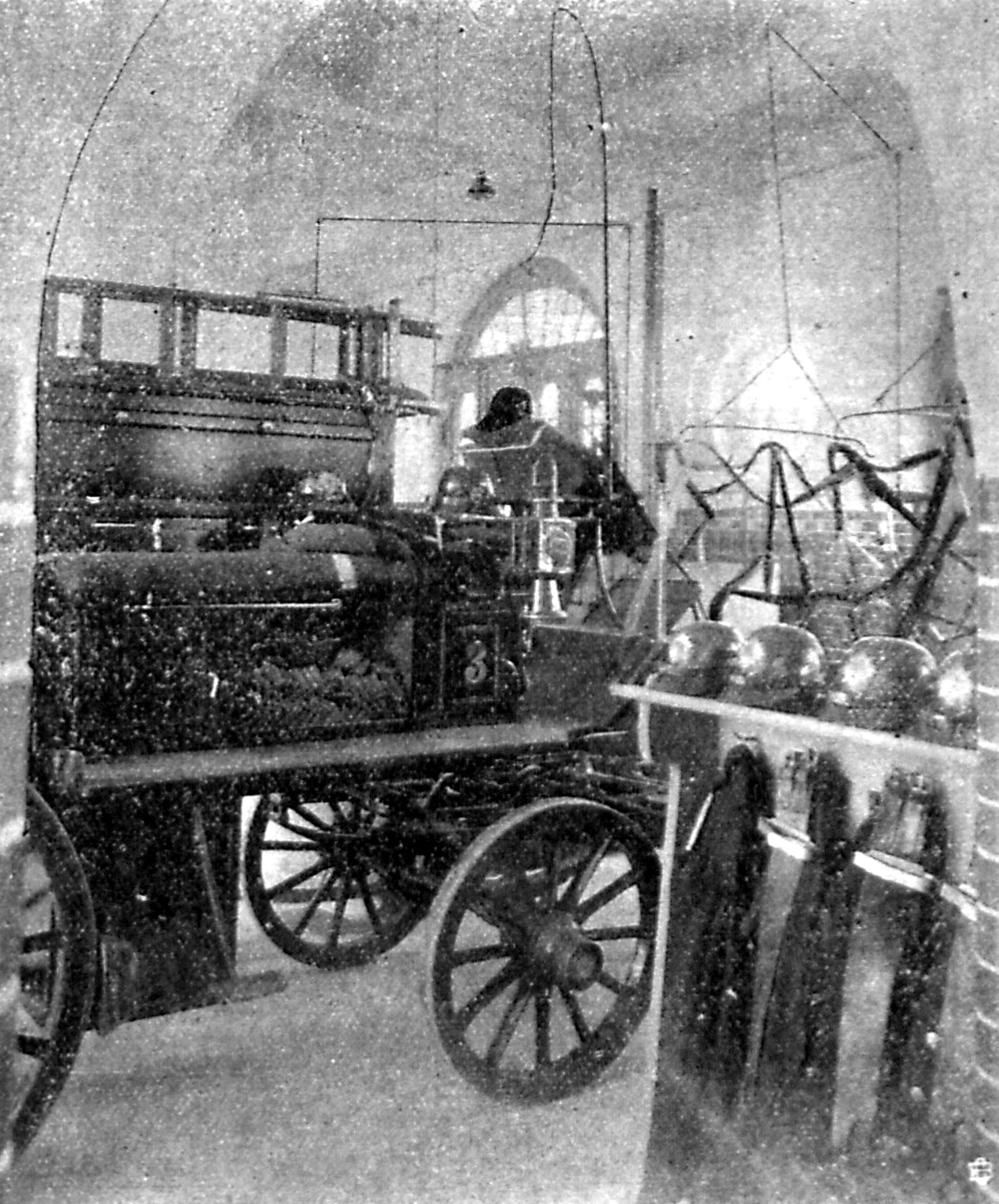 Am Stand eines Alarmfahrzeuges im Alarmraum der neuen Lübecker Hauptfeuerwache (1906).